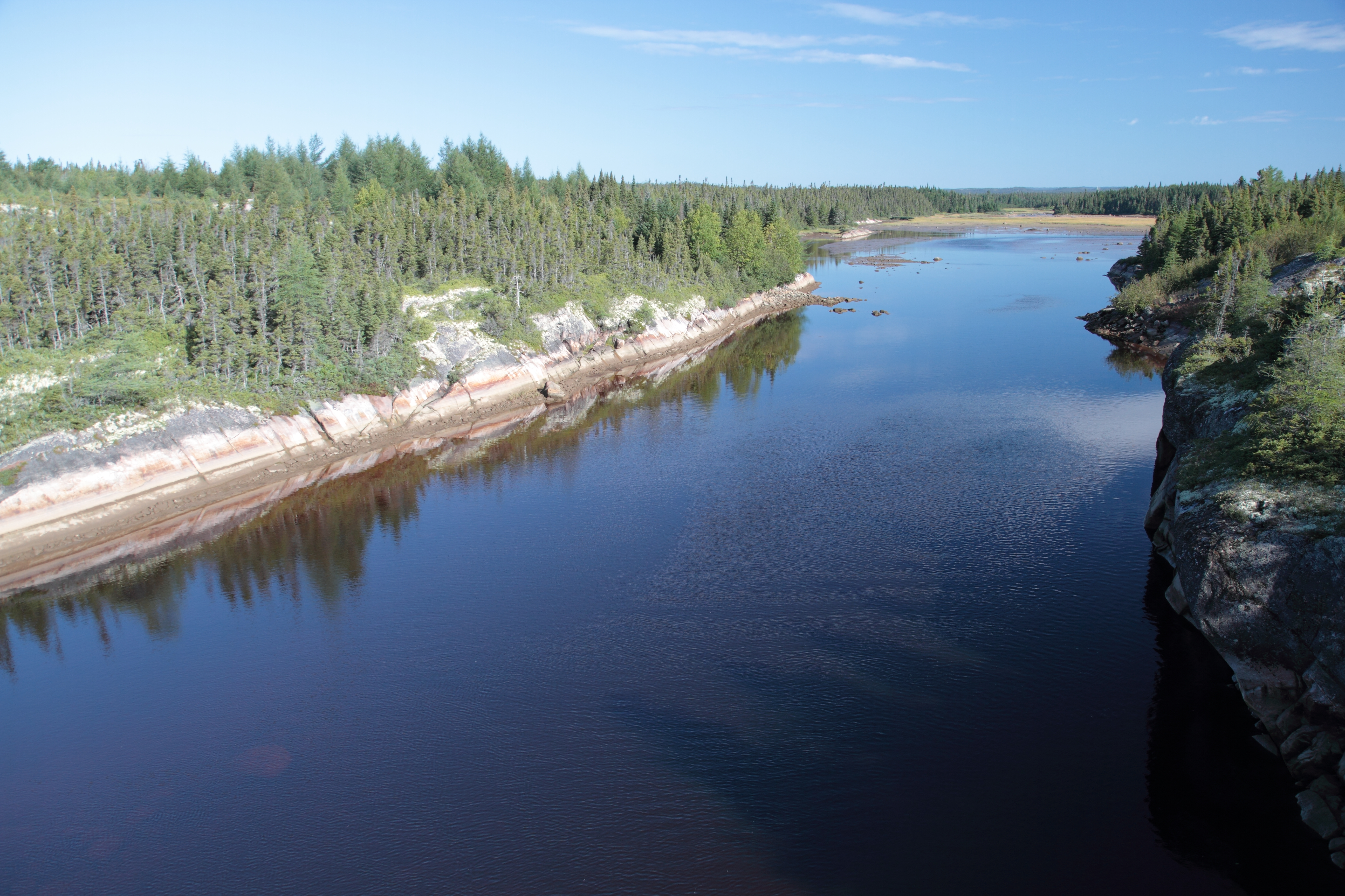 Rivière Pashashibou, Aguanish, Québec, Canada